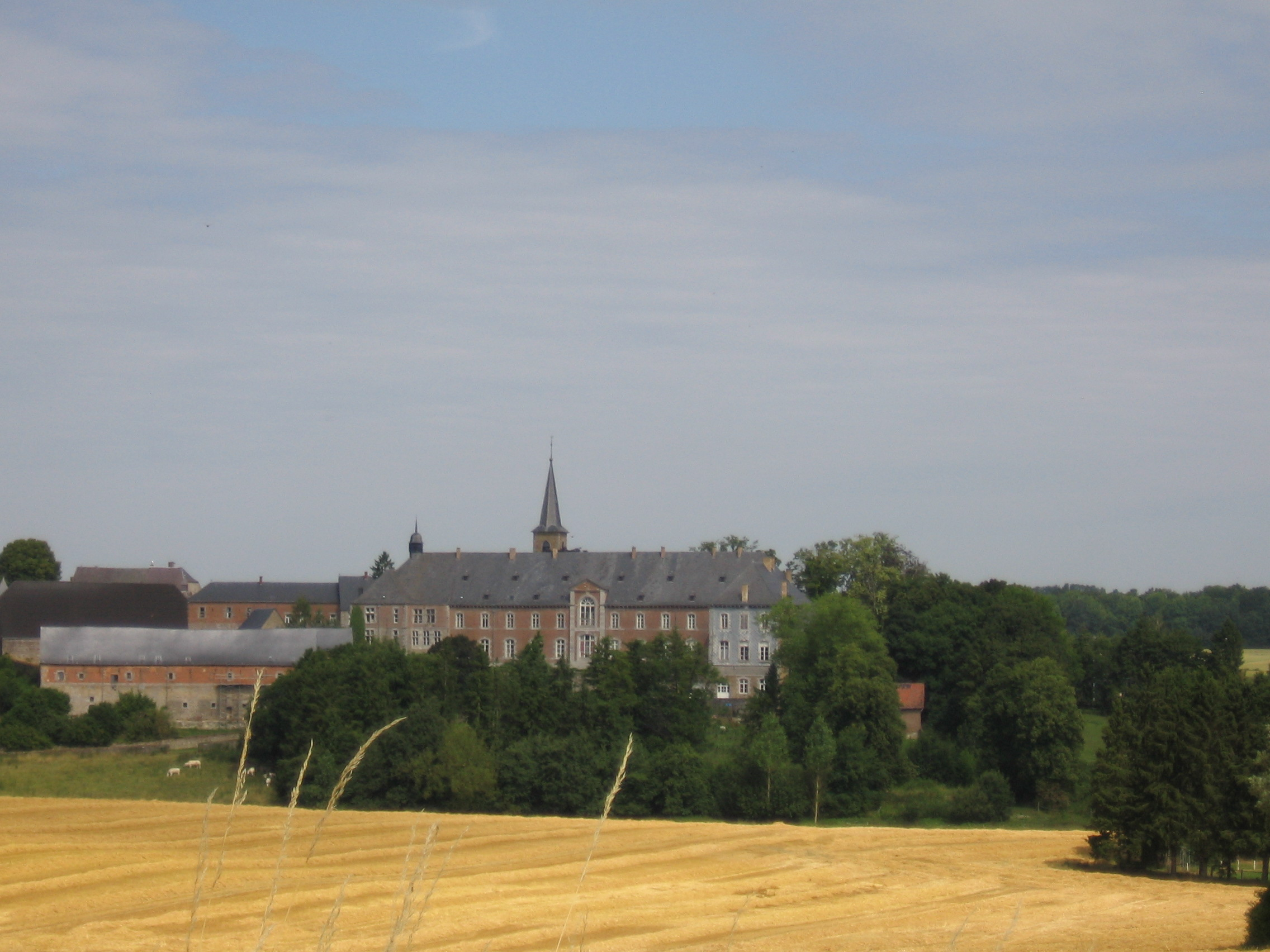 Abbaye Saint-Gérard de Brogne, à Saint-Gérard (Belgique)